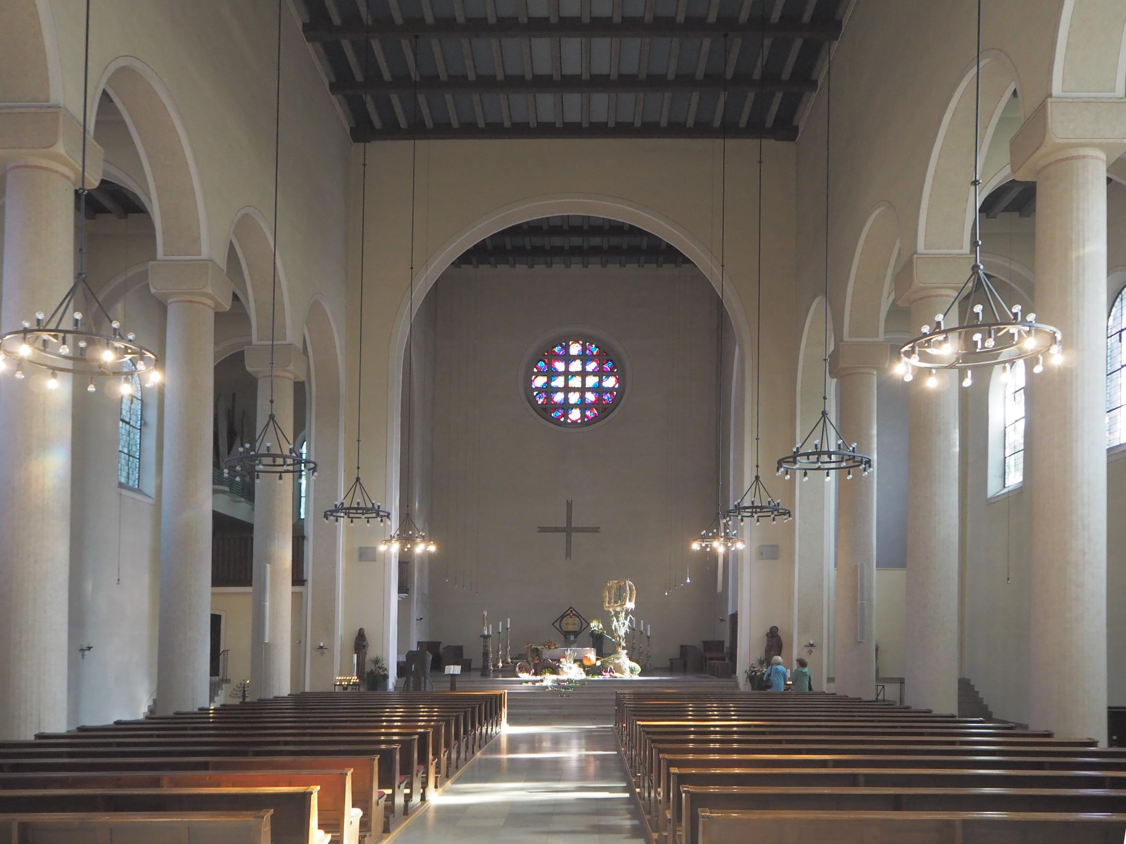 Dorsten, NRW, St.-Agatha-Kirche - Inneres , Foto: September 2015